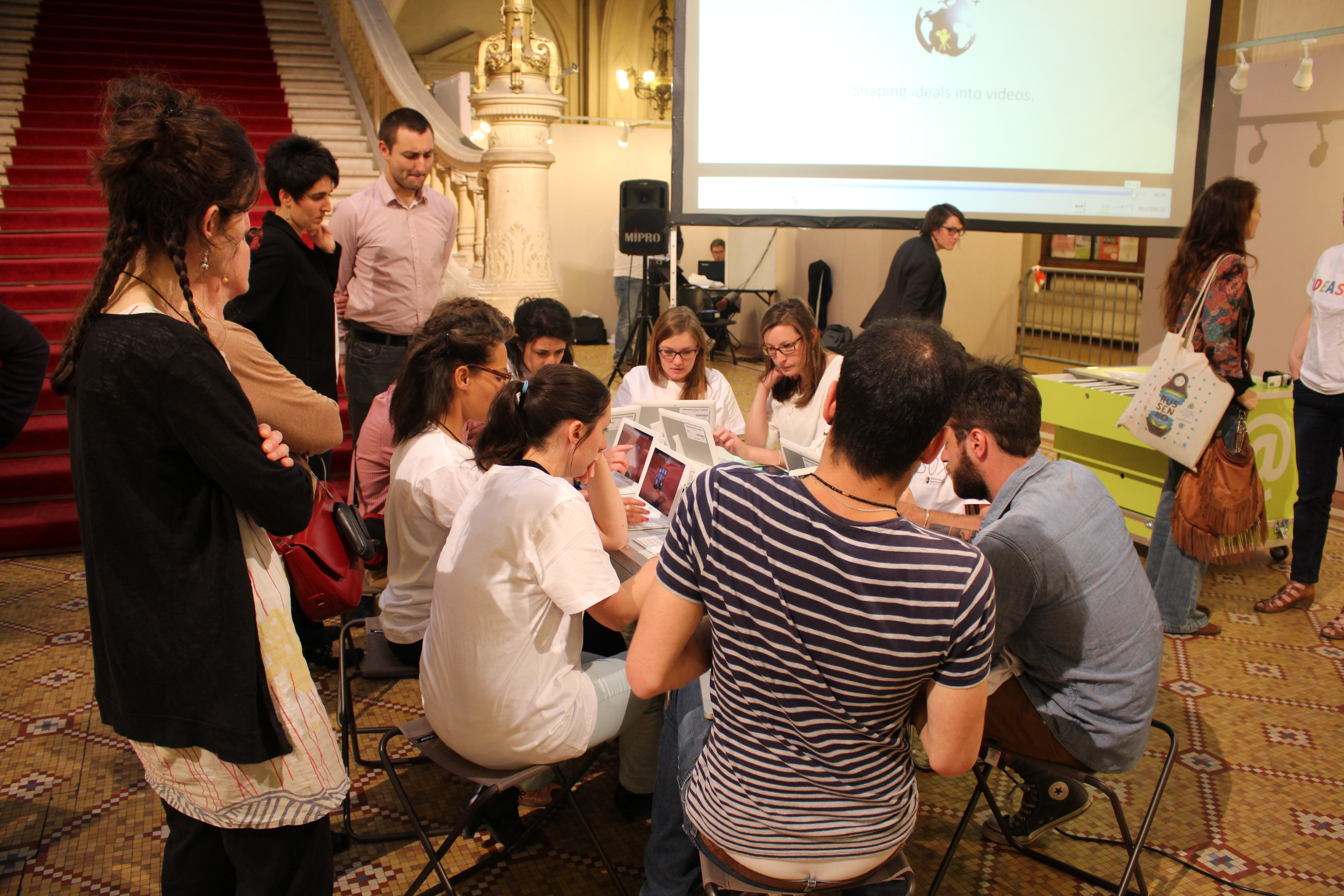 Bibliothèques Sans Frontières - Ideas Box à la Mairie du 10e, Paris.